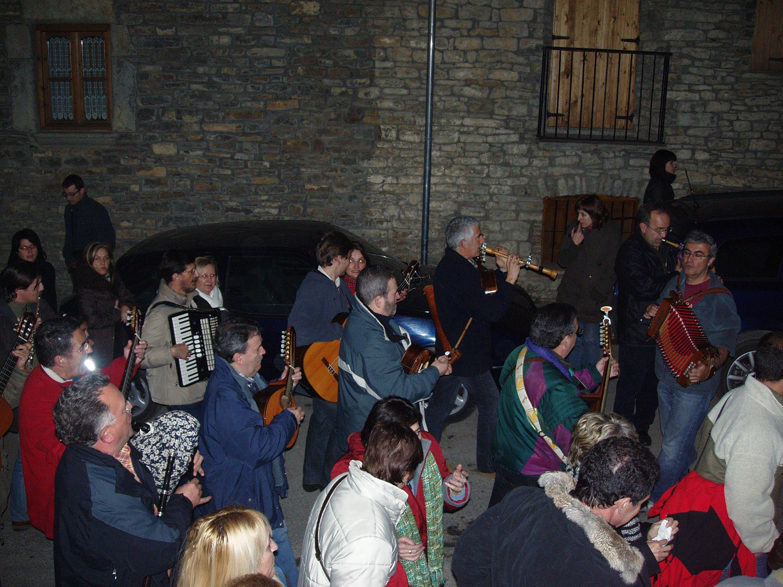 Aragonés: La ronda de BoltañaLa ronda de Boltaña